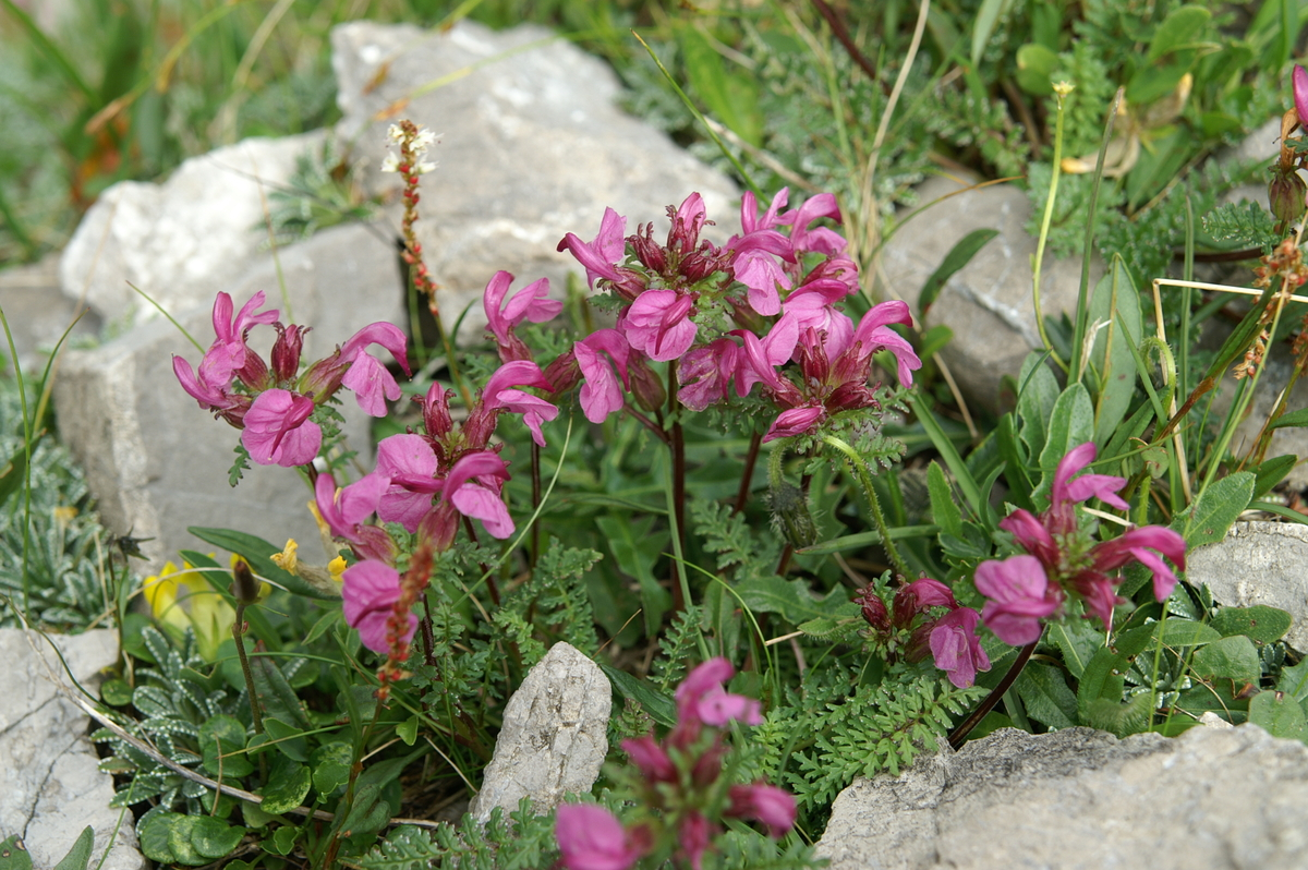 glavičasti ušivec na Korošici.